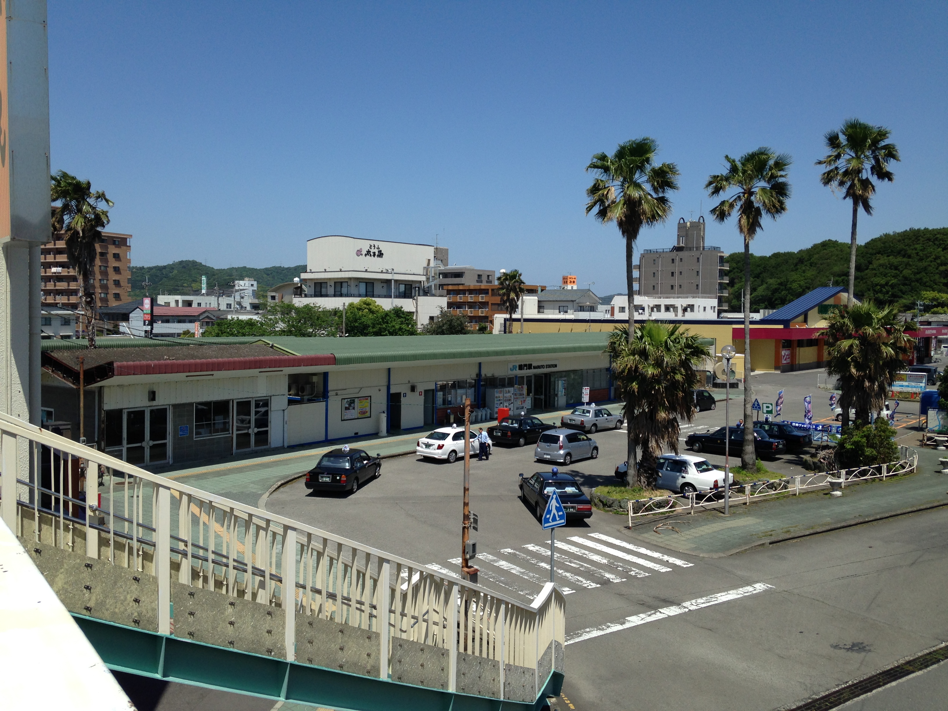 国道28号の跨線橋より望む鳴門駅